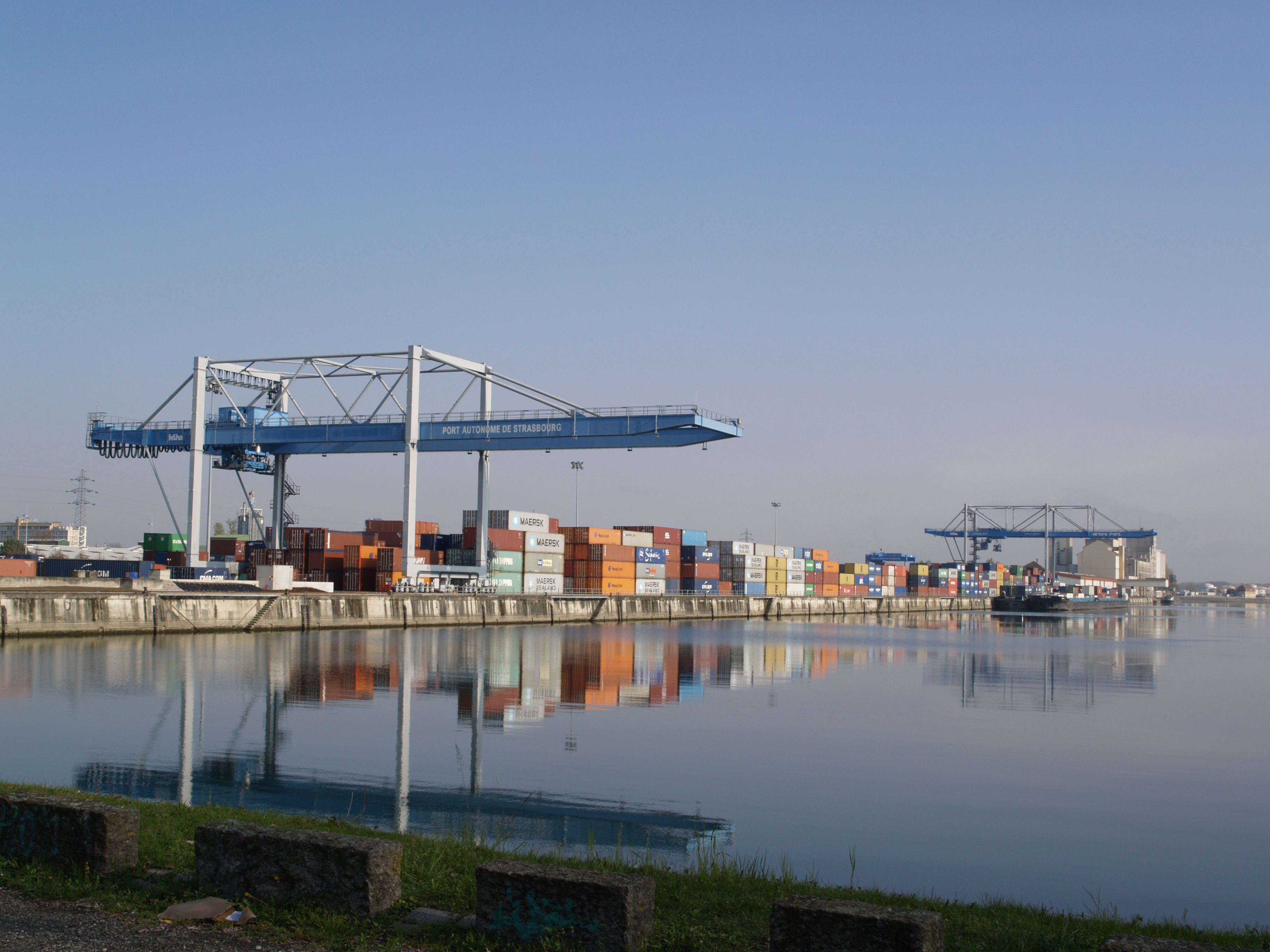 Vue des portiques du Port autonome de Strasbourg